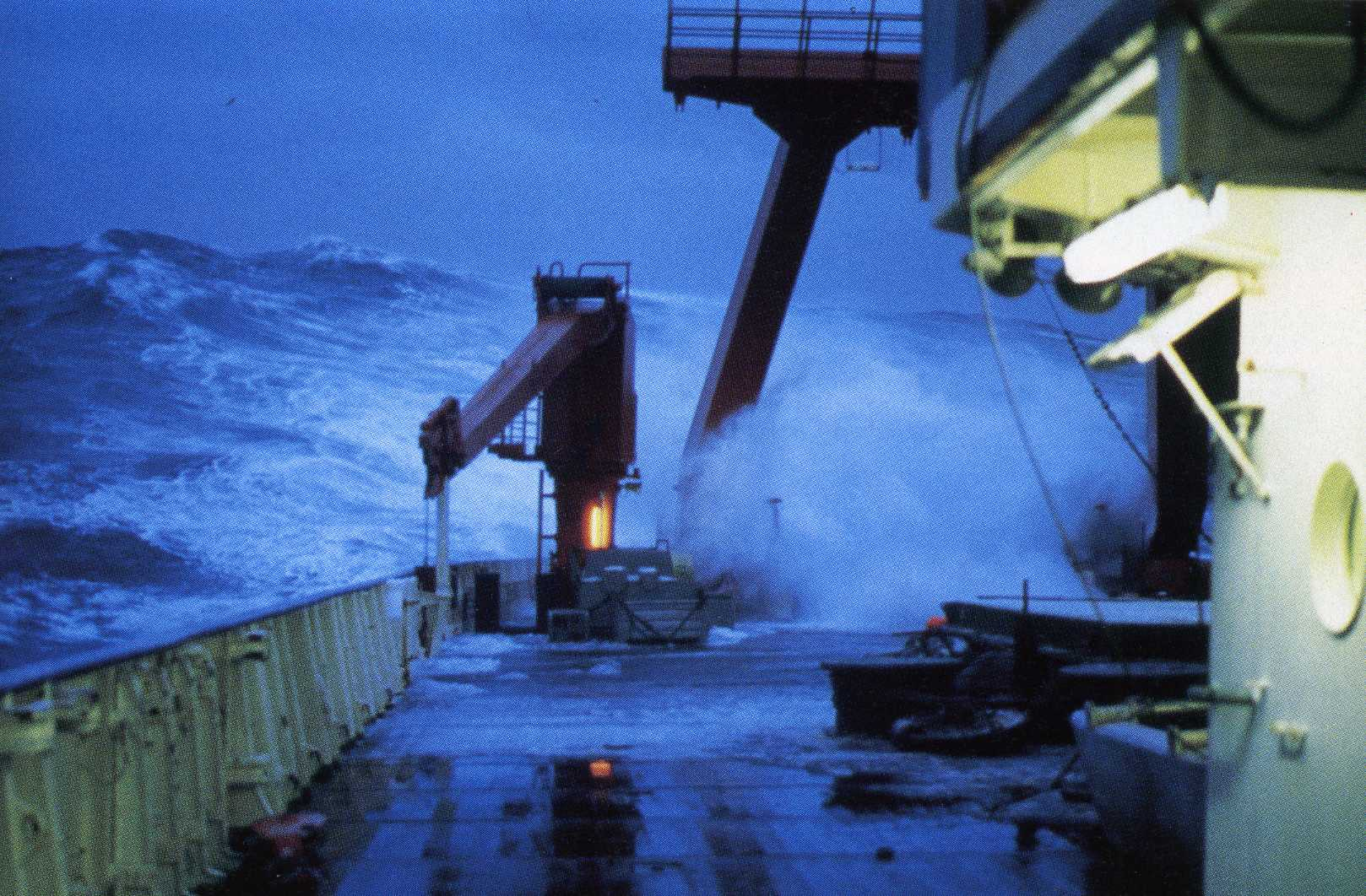 Gischt auf hoher See, auch „grüne See“ genannt.